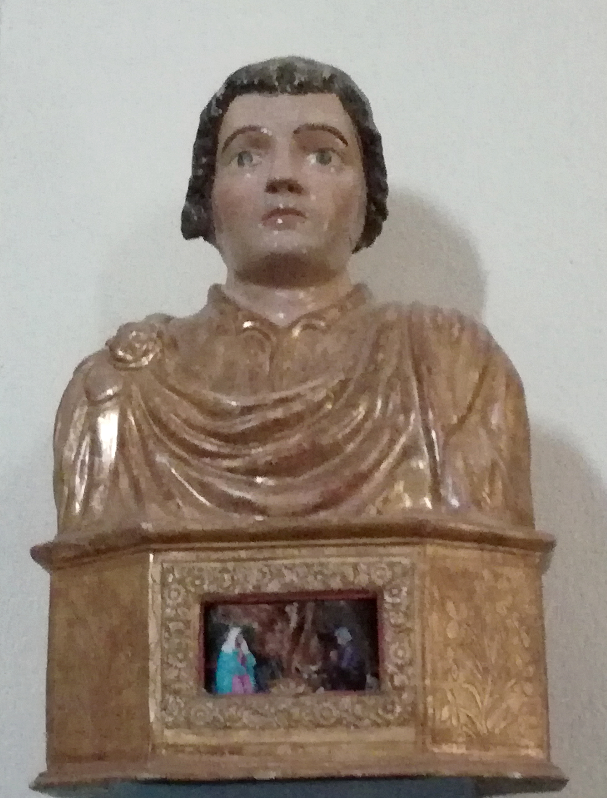 Buste de saint Quinis situé dans la chapelle de l'ermitage de Saint Quinis, Camps-la-source (Var) France